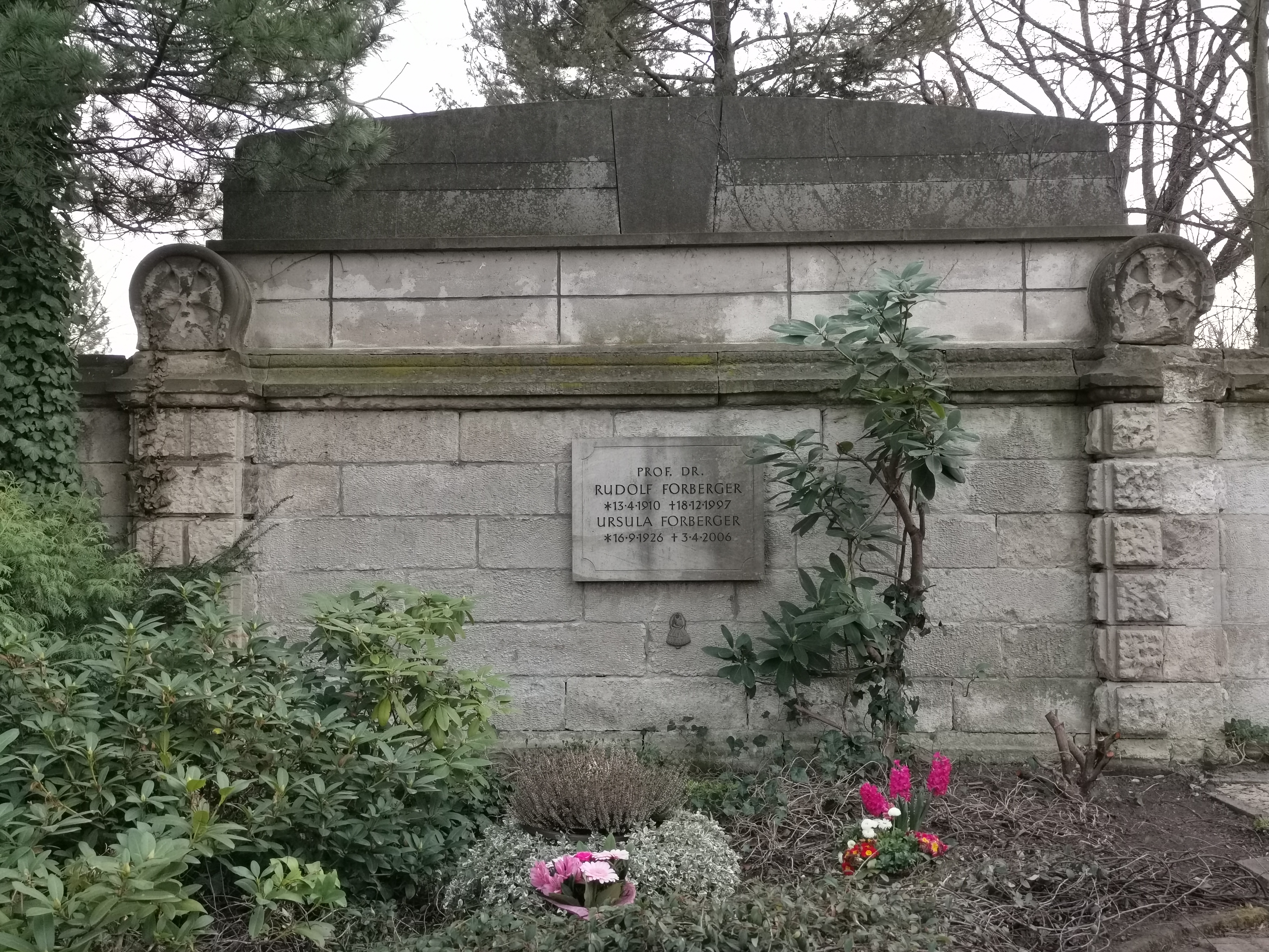 Grab von Rudolf Forberger (1910–1997) auf dem Striesener Friedhof